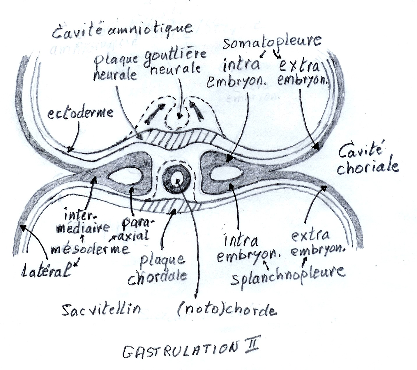 Description: Embryogenèse--Gastrulation. Montre la mise en place de la chorde, la formation du canal neural et la différentiation du mésoderme intraembryonnaire. Source: Dessin original. Auteur: Michel Hamels. Cette image est: librement diffusable à titre commercial ou non librement modifiable et l'image modifiée est elle-même librement modifiable et diffusable à titre commercial ou non. Michel Hamels 28 mars 2006 à 21:55 (CEST)